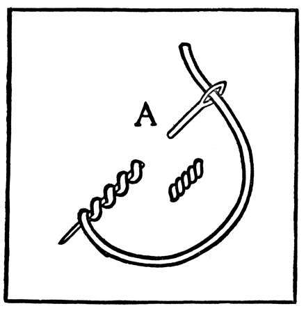 Bullion knot